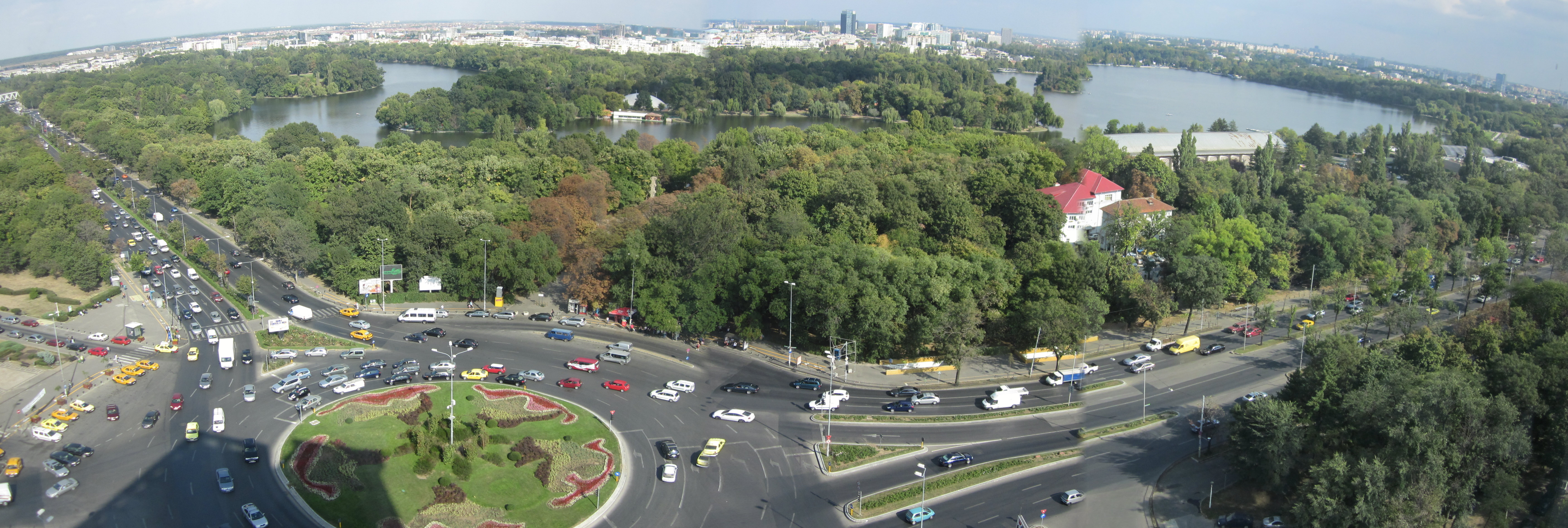 Parcul Herastrau vedere panoramica.